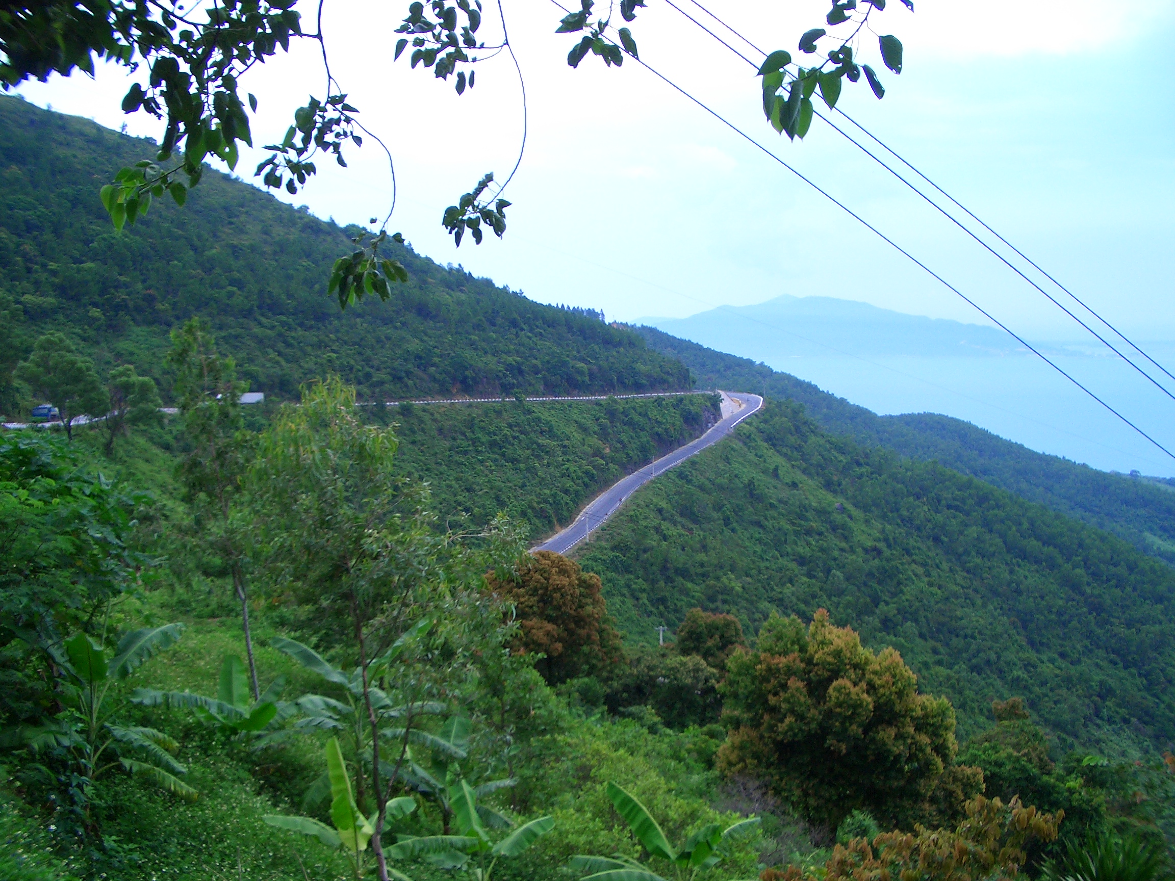 Hai Van pass, Central Vietnam.